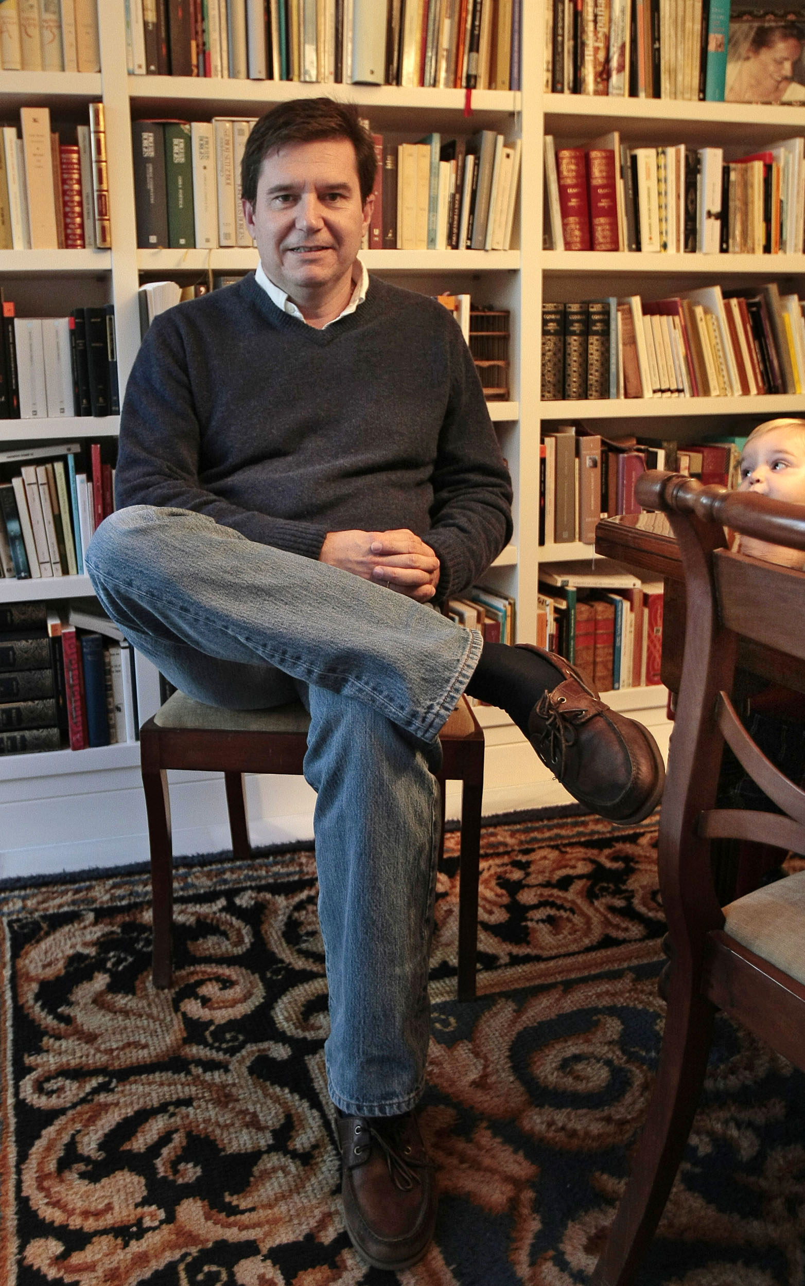 Enrique García-Máiquez